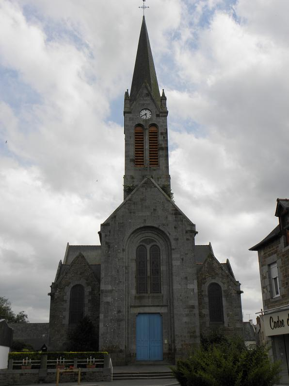 Église Saint-Sulpice de Sens-de-Bretagne (35).